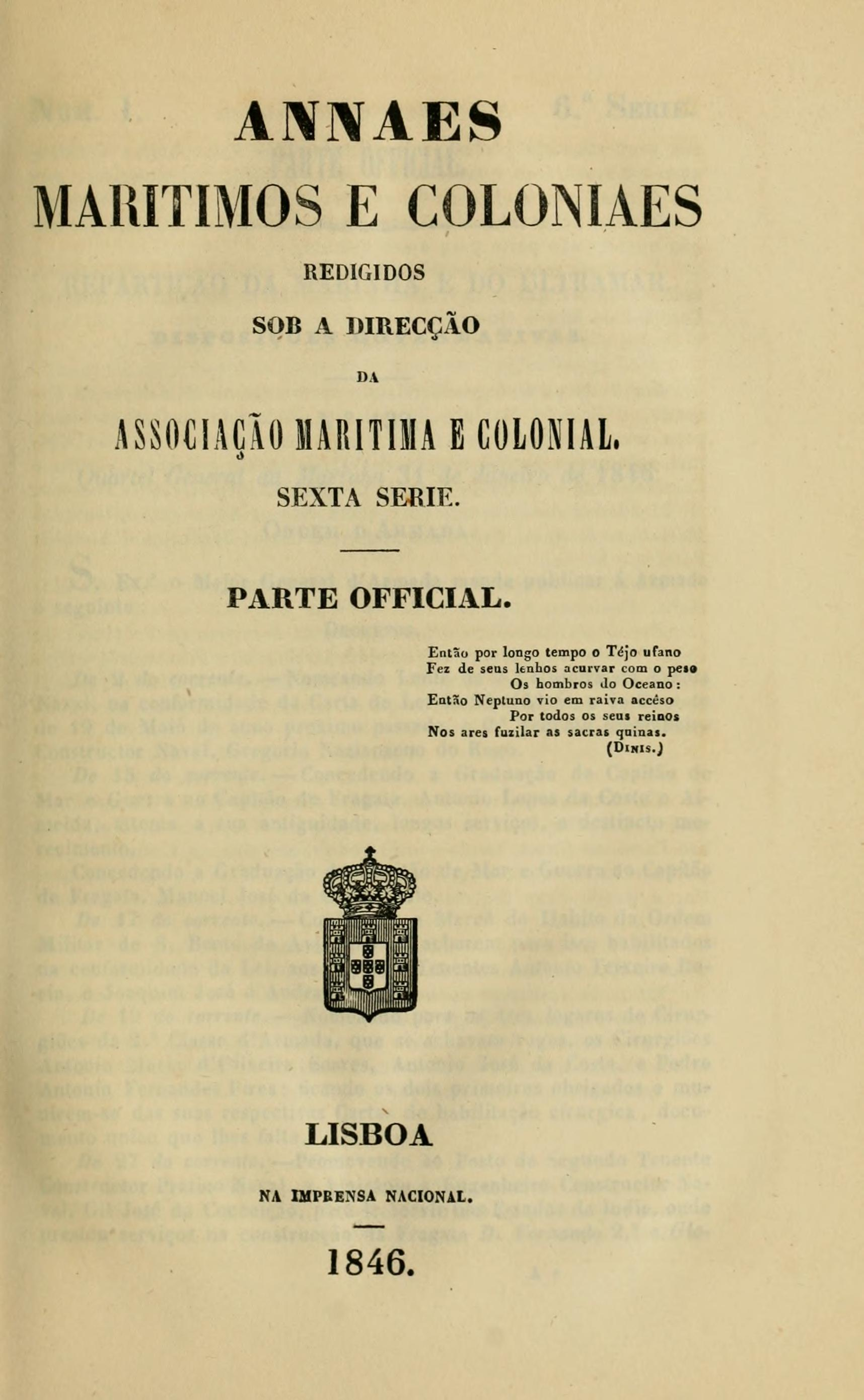 Annaes Maritimos e Coloniaes.